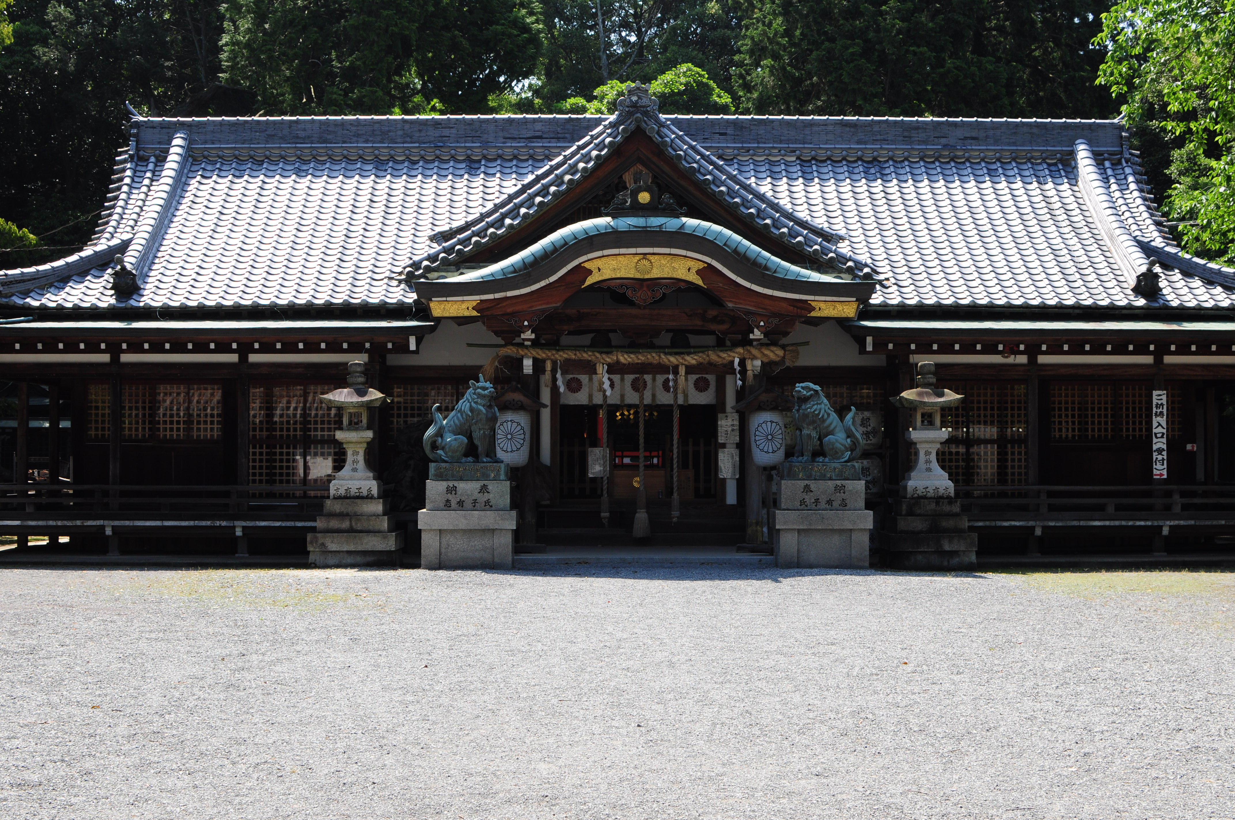 日根神社拝殿正面